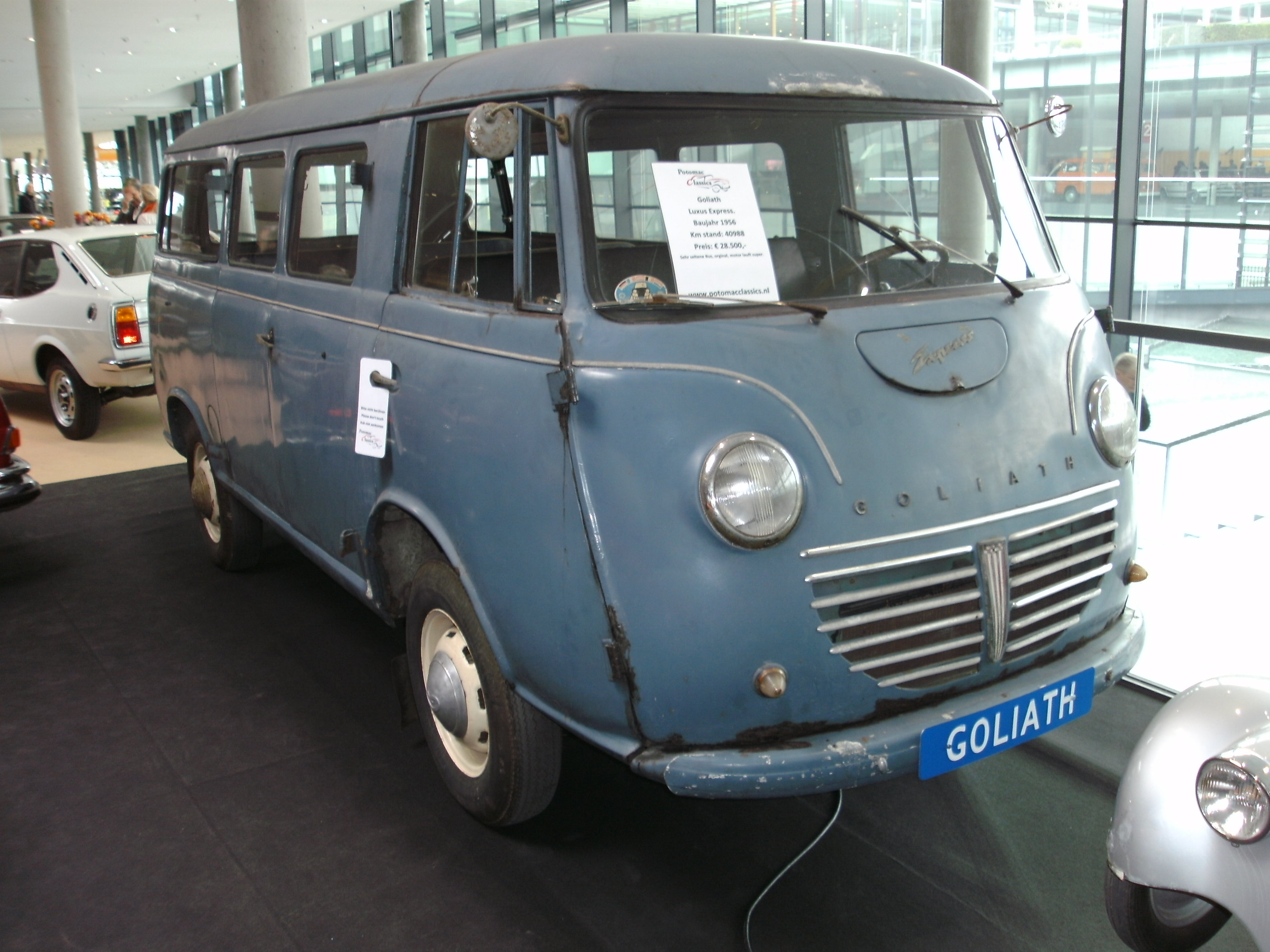 Goliath Express, Baujahr 1956